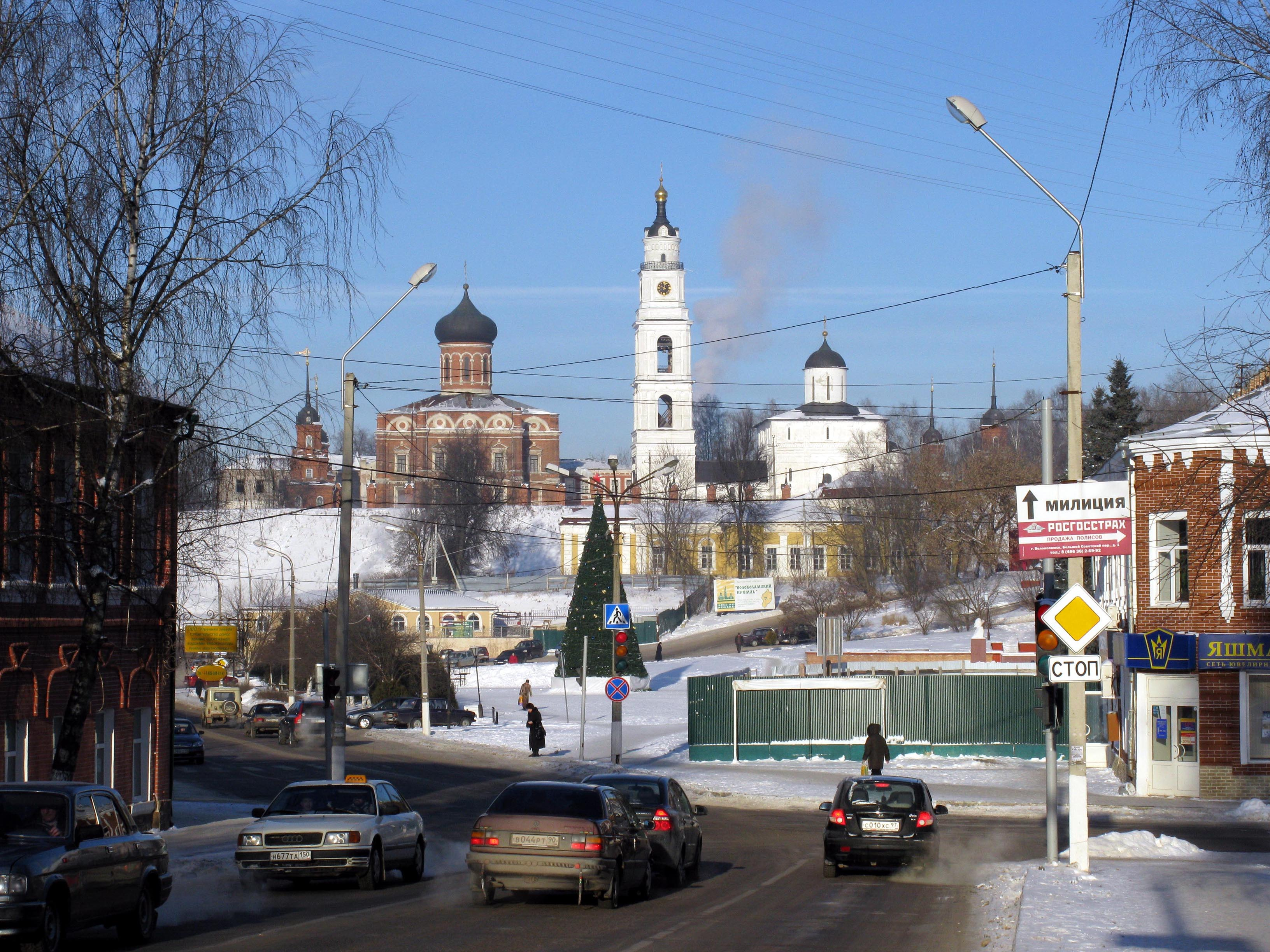 Волоколамск